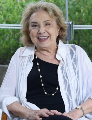 Atriz